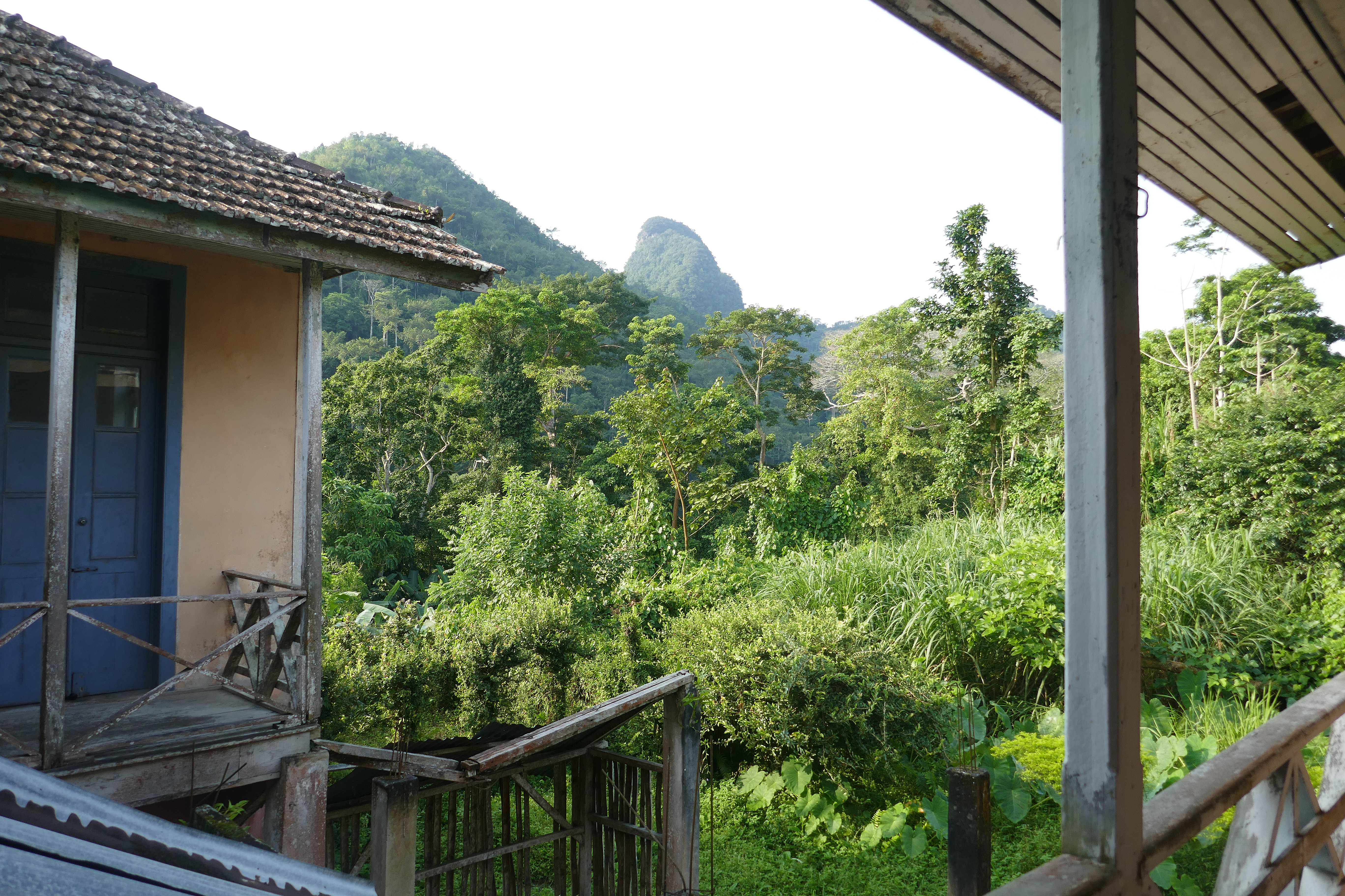 Pousada Roça Bombaim, au centre de l'île de São Tomé (São Tomé-et-Principe).